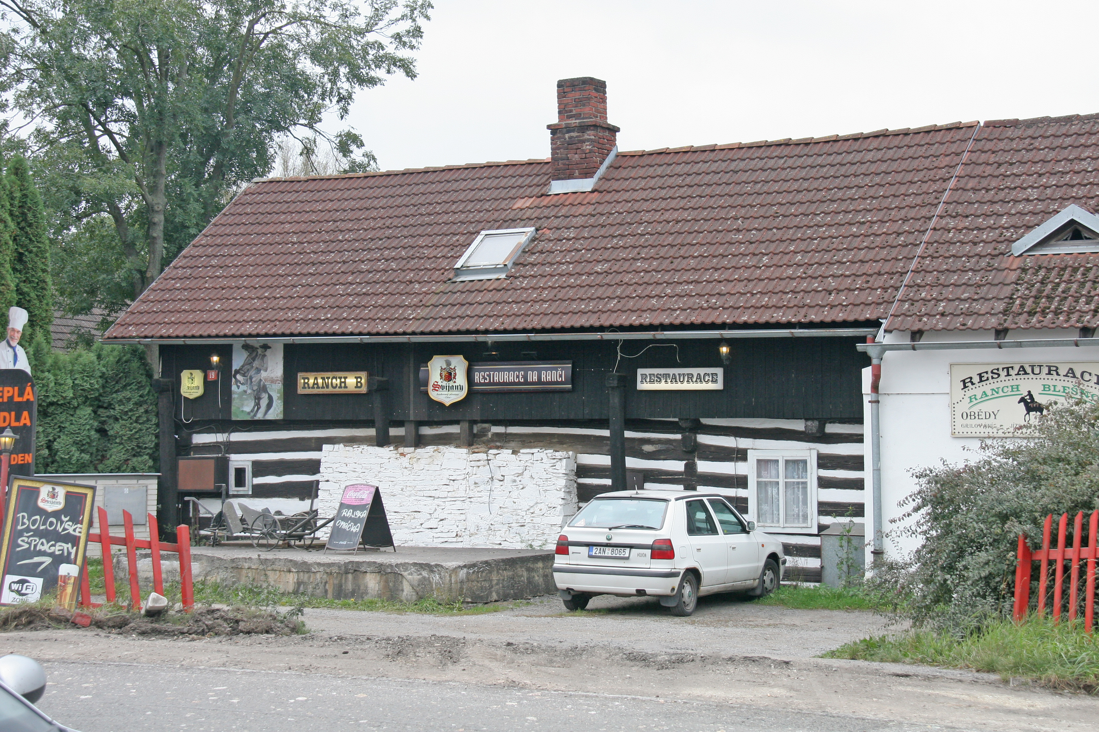 Blešno ranč, čp. 19.